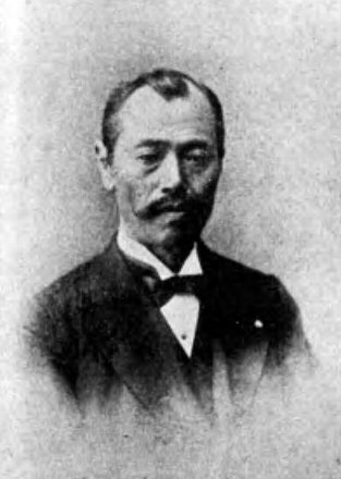 関義臣（1839-1918）